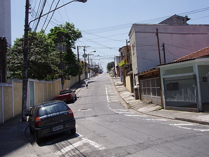 Rua Simao Lopez 04167-001 São Paulo - SP (Brazil)